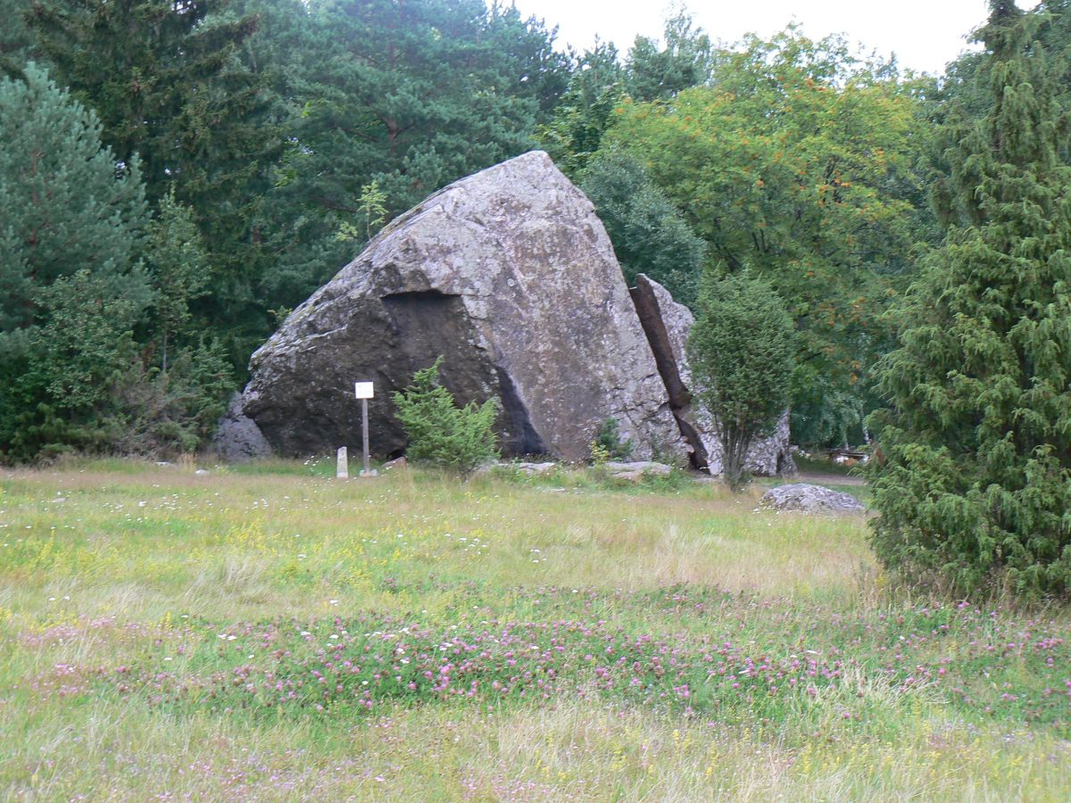 Jaani-Tooma suurkivi.